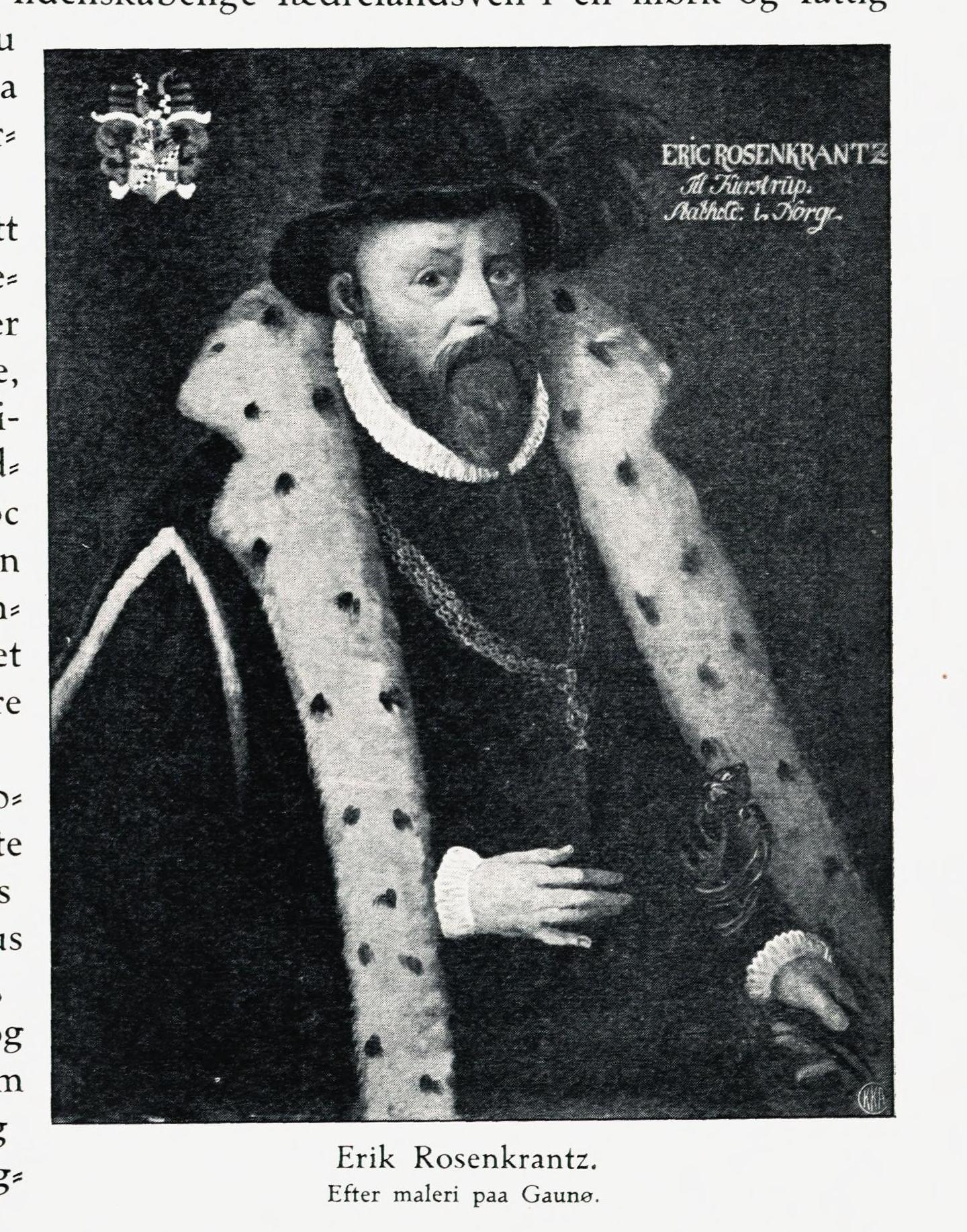 Erik Rosenkrantz. Illustrasjon hentet fra boken "Svanøen i Søndfjord" av Schou, Alhed og utgitt av Aschehoug (Kristiania, 1912)